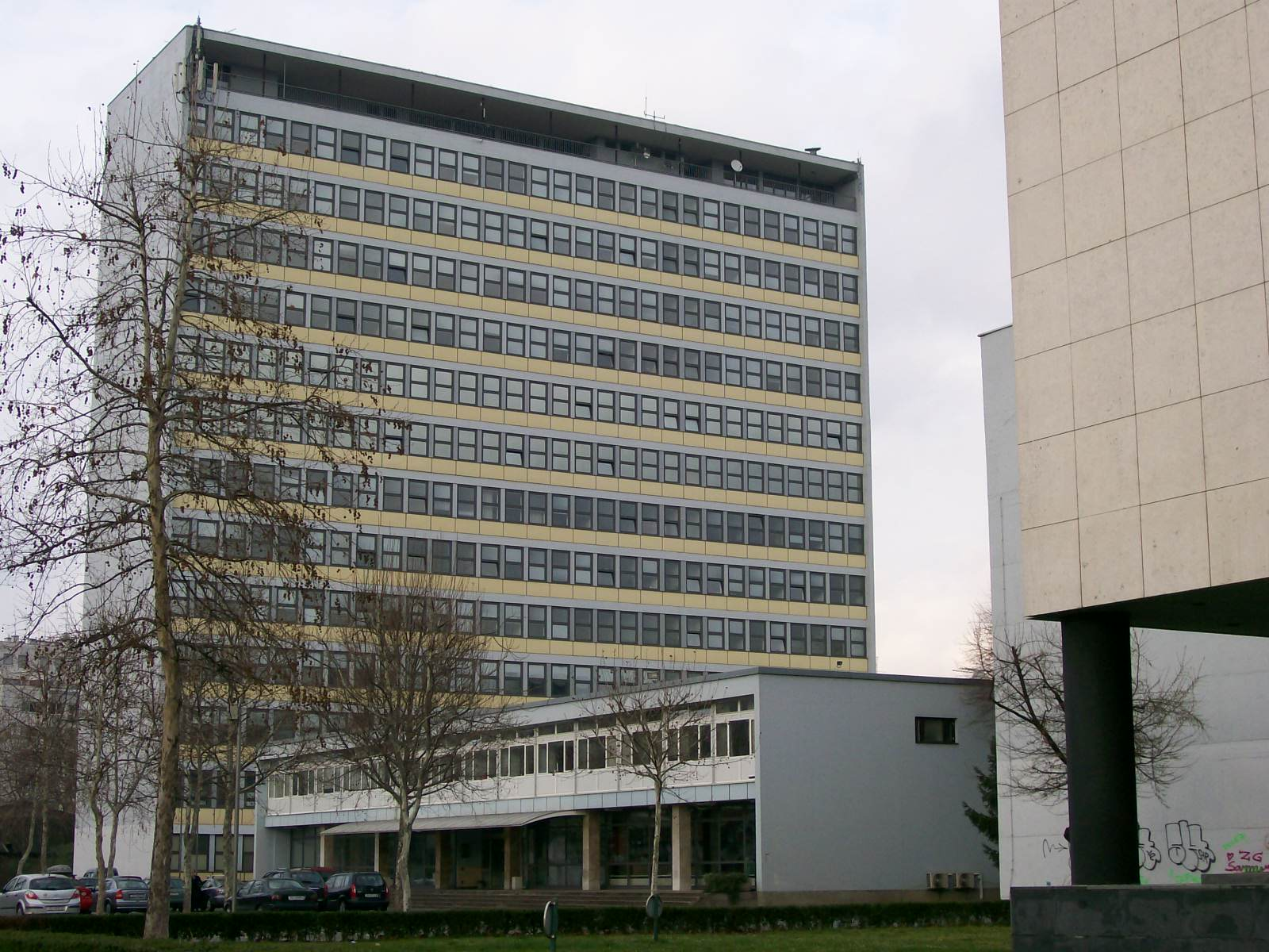 Fakultet elektrotehnike i računarstva u Zagrebu